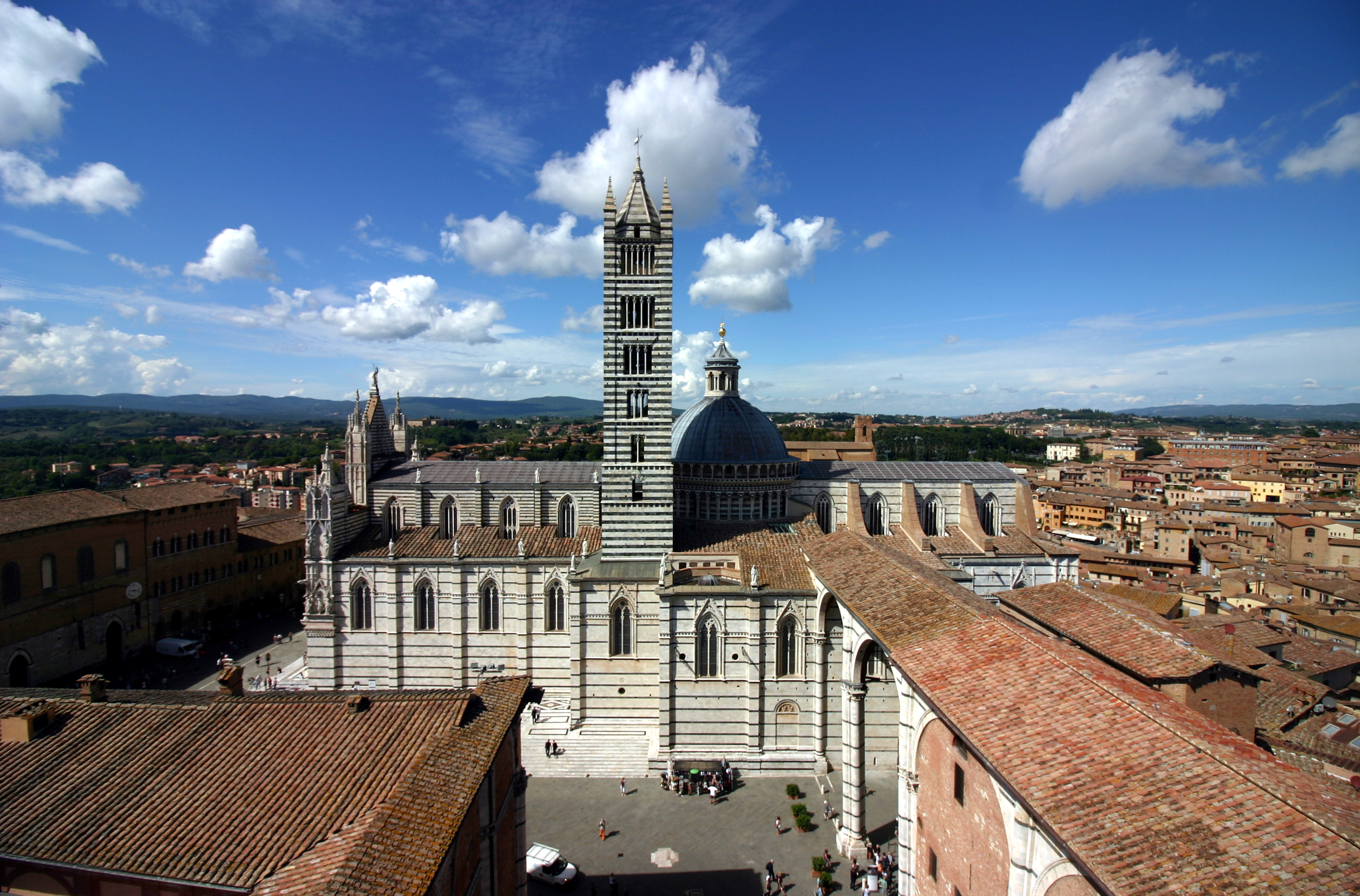 Duomo - Siena